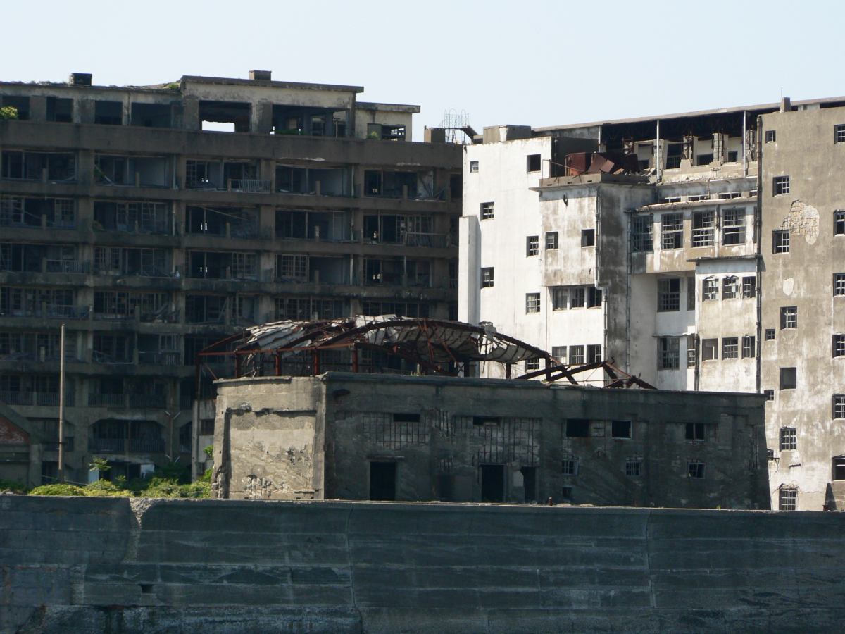 軍艦島(端島)の写真。右が70号棟(端島小中学校)、左は65号棟(鉱員社宅/屋上幼稚園)、手前は資材倉庫。